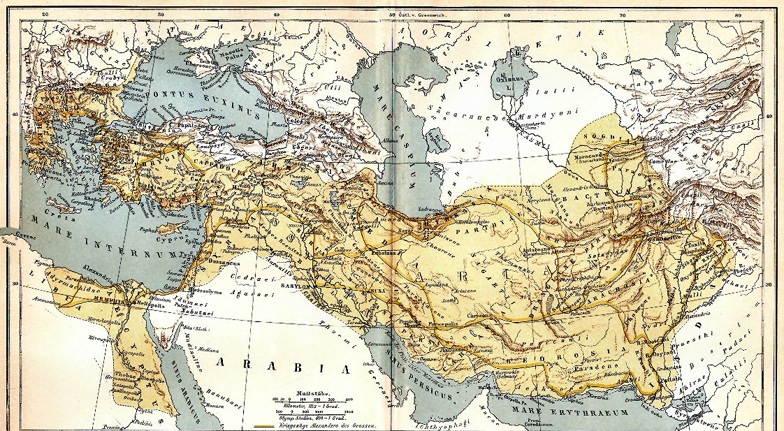 Alexander old drawings